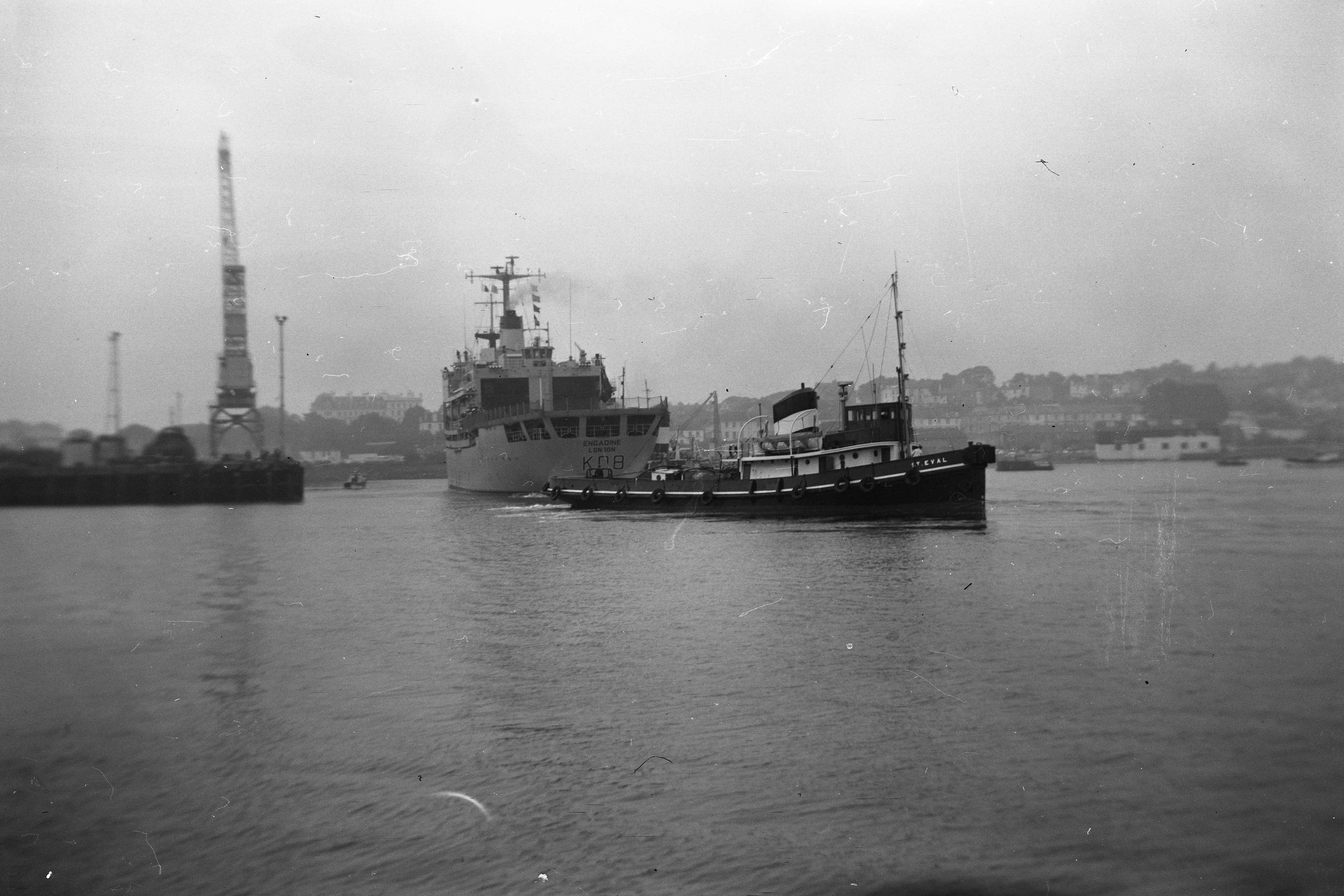 Coronet Clipper 120 roll film camera, scan from negative.